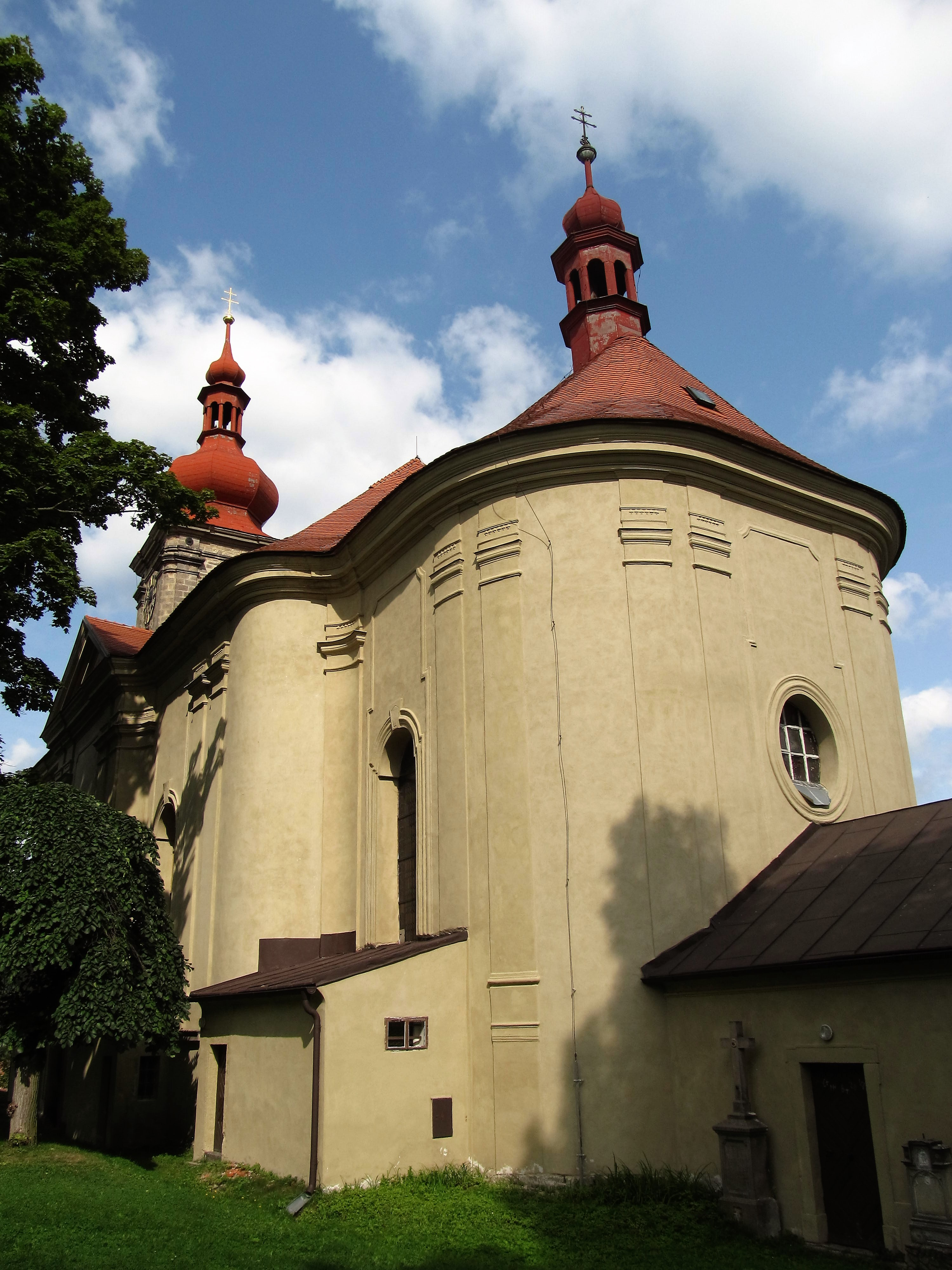 Pohled na kostel sv. Jiří od jihovýchodu